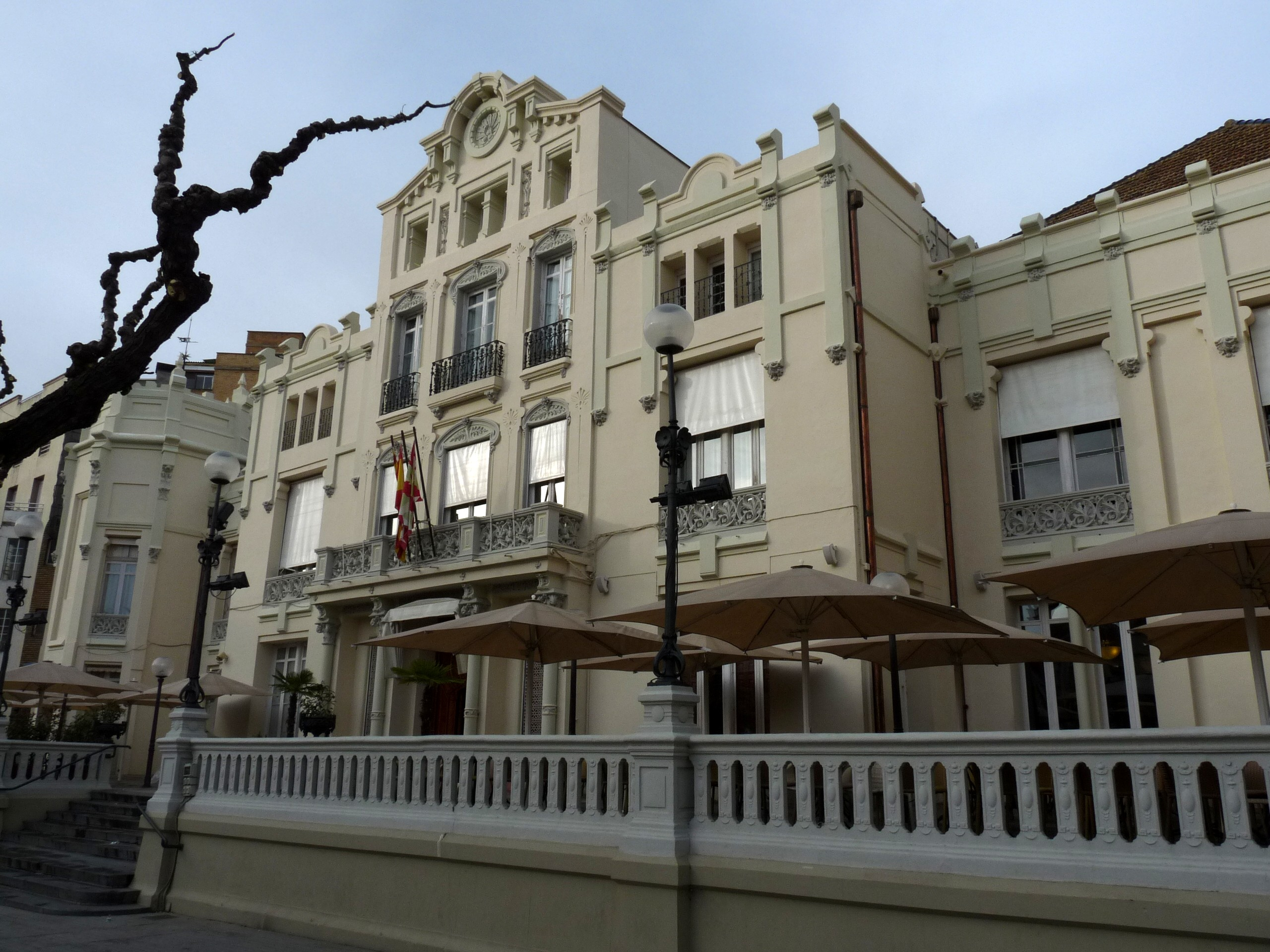 Huesca - Fachada del Casino (1904)